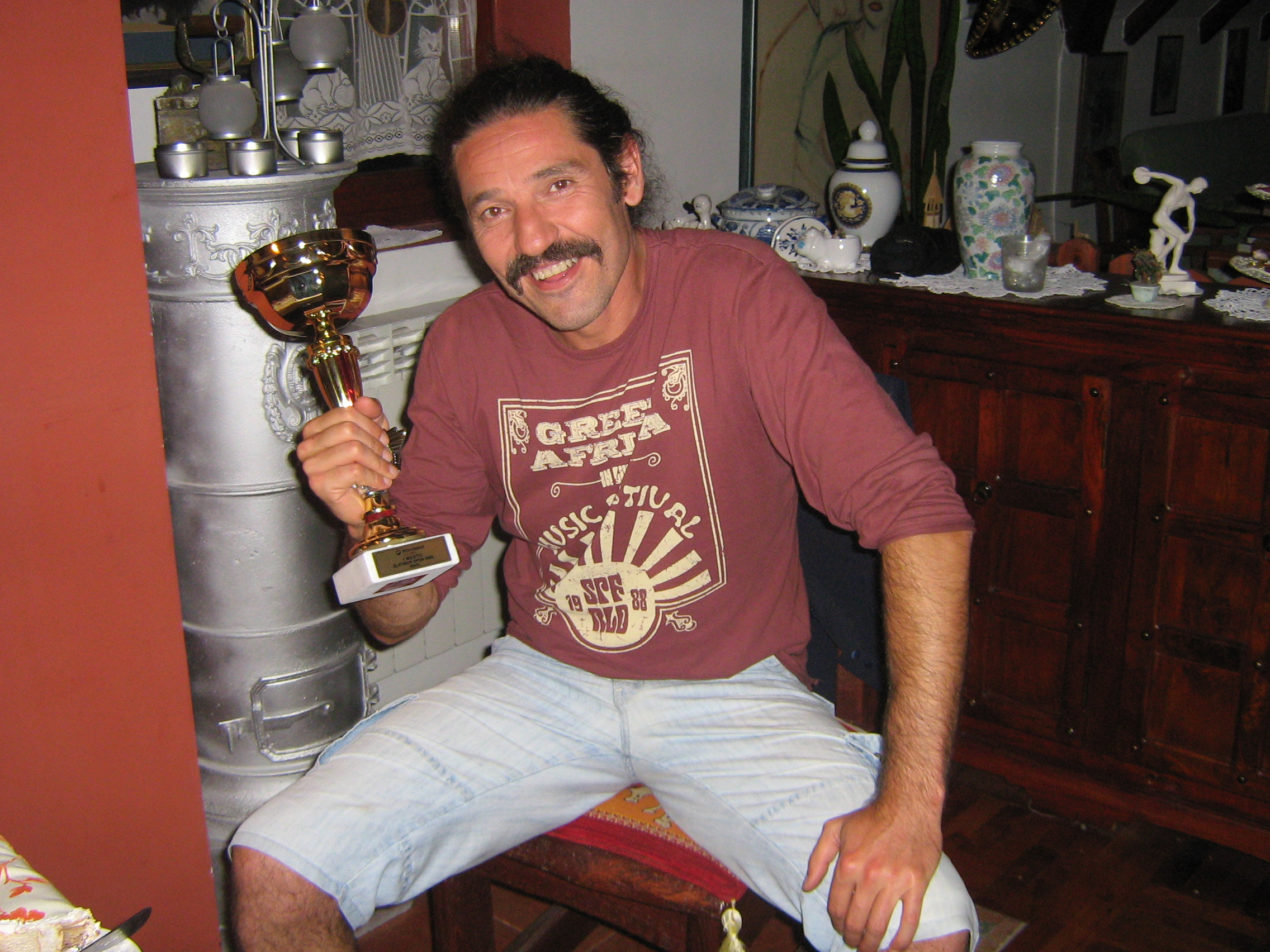 Fotografija Snežana Milosavljević Privatni album Fotografiju sam napravila sama i može je koristiti ko želi,naravno bez njene izmene i zloupotrebe